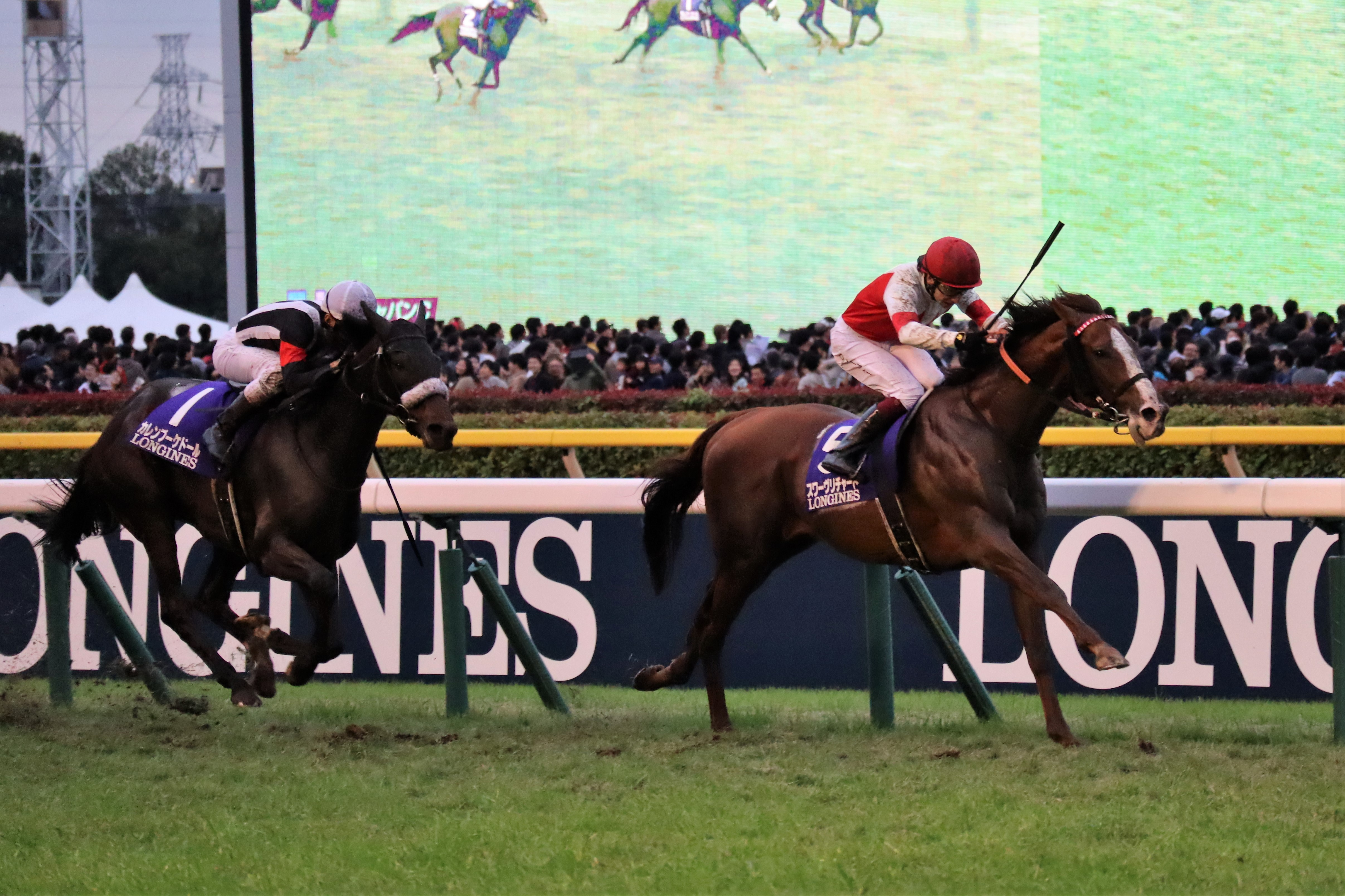 第39回ジャパンカップ ゴール前